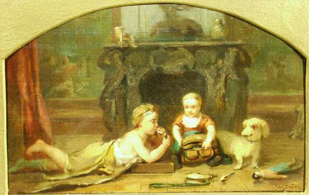 "Zwei spielender Kinder",sign., Öl/Malpappe, 25 x 37 cm